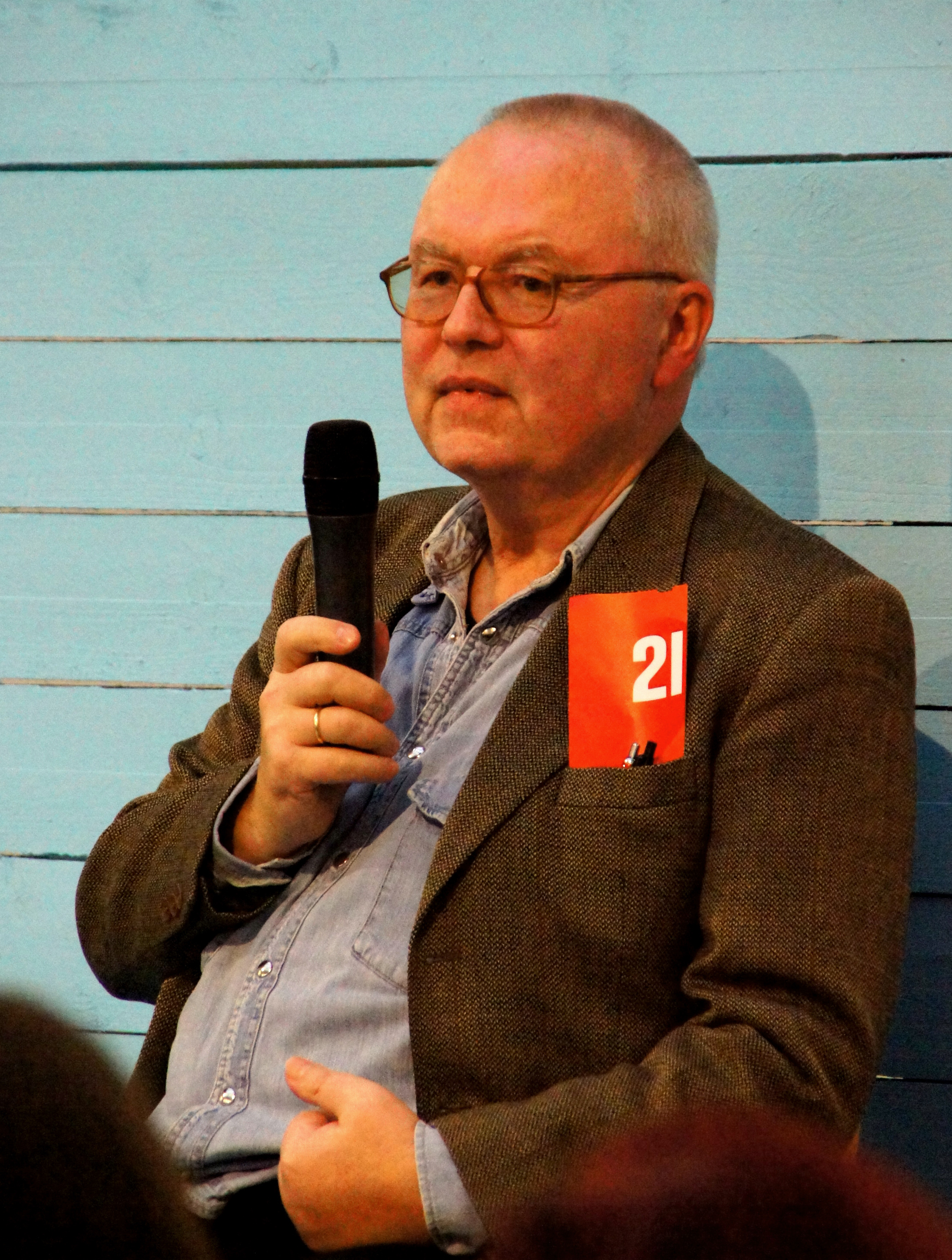 Unter dem Titel "Eine Versammlung kommt selten allein" lasen, anlässlich des 40. Jahrestages der Gründung, Lyriker und Lyrikerinnen der Grazer Autorinnen Autorenversammlung im "Salon für Kunstbuch im 21er Haus". Abgebildete Personen: S. Dateiname.